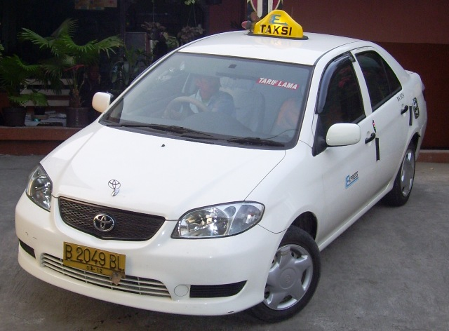 Express taxi Jakarta - tarif lama